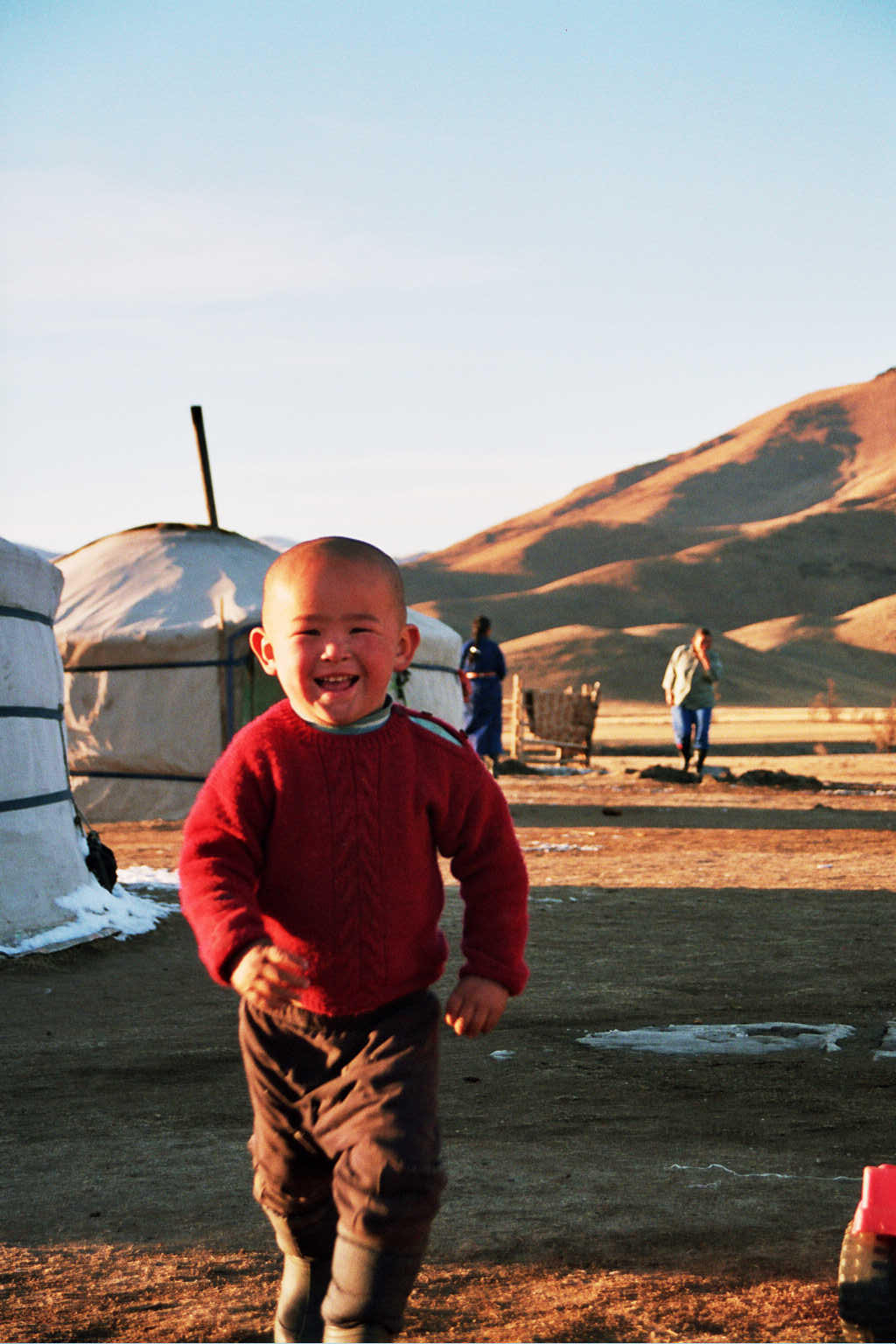 Enfant de Mongolie